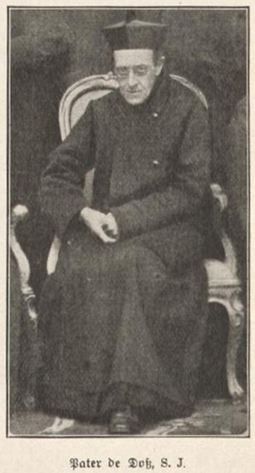 Pater Adolf Doß S.J. (1825-1886) Jesuit, Schriftsteller und Komponist